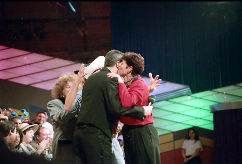 אחת הזוכות במכונית בעשינו עסק והמנחה אברי גלעד